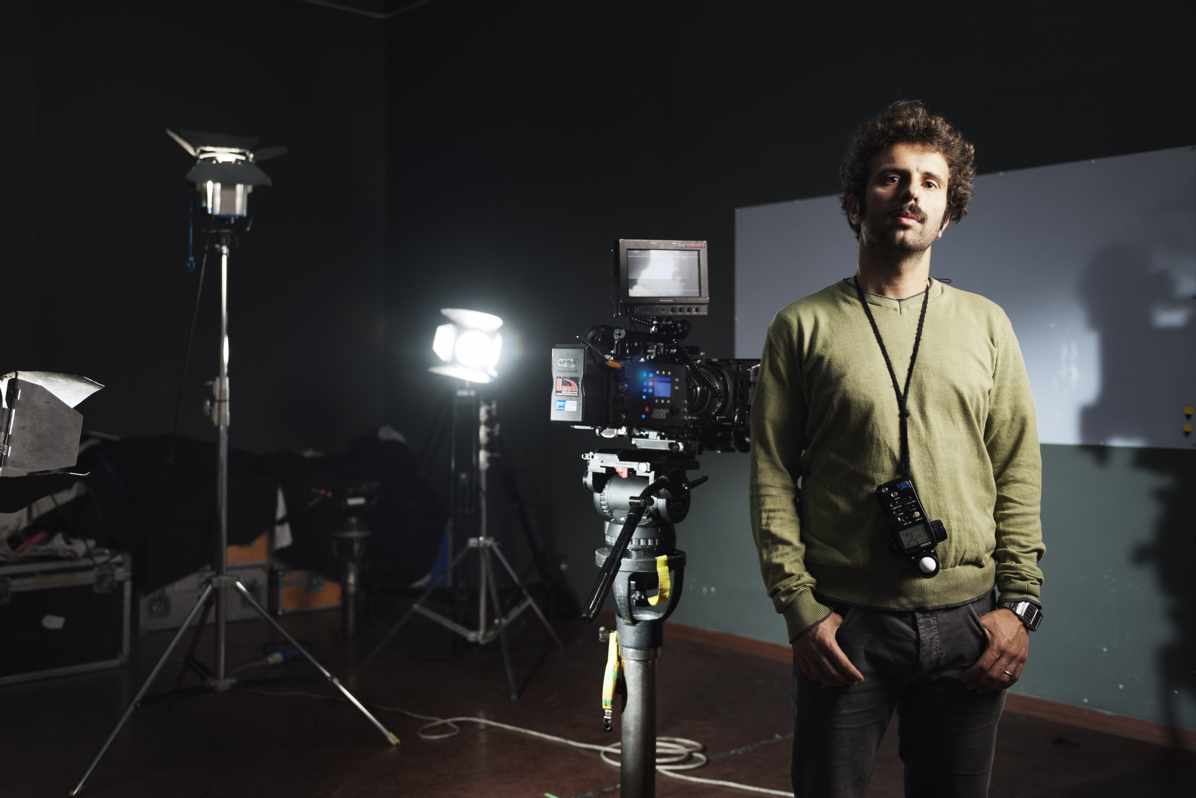 Direttore della fotografia